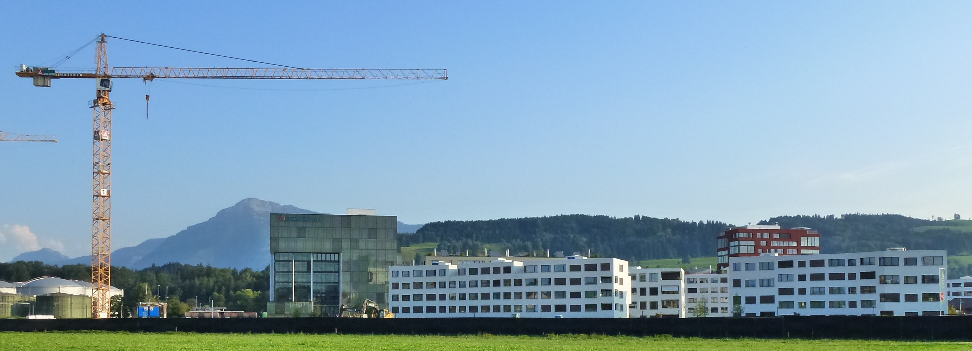 Novartis in der Suurstoffi, Rotkreuz